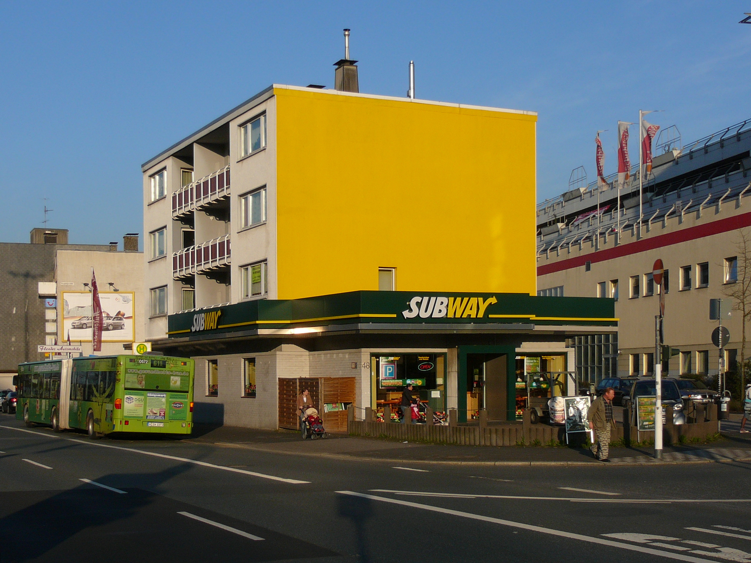 Friedrich-Engels-Allee, Wuppertal